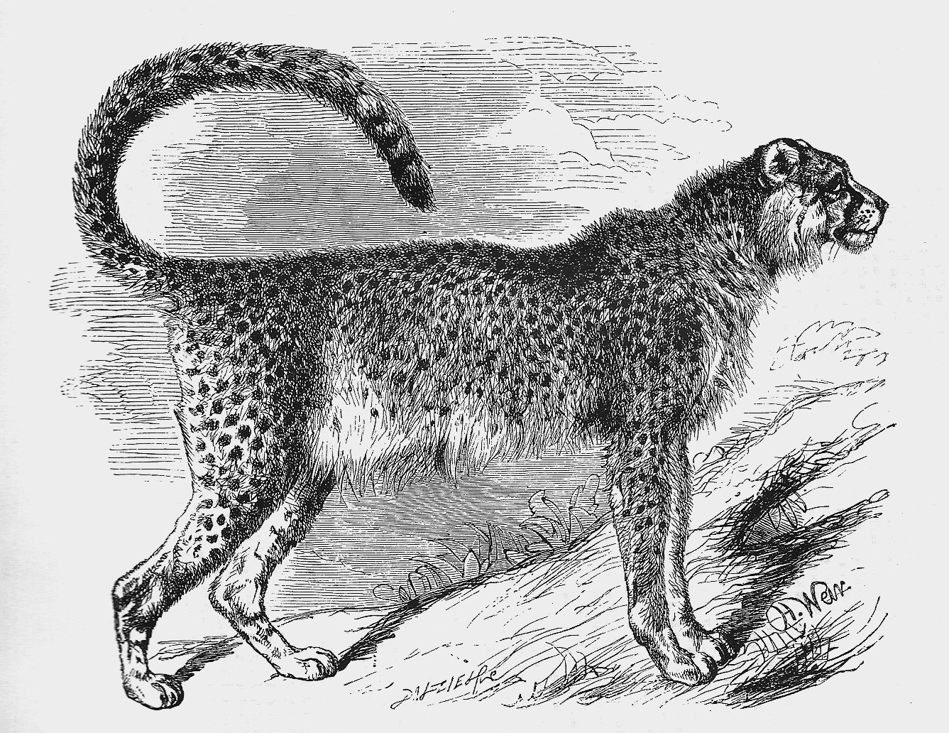 "Cheetah"